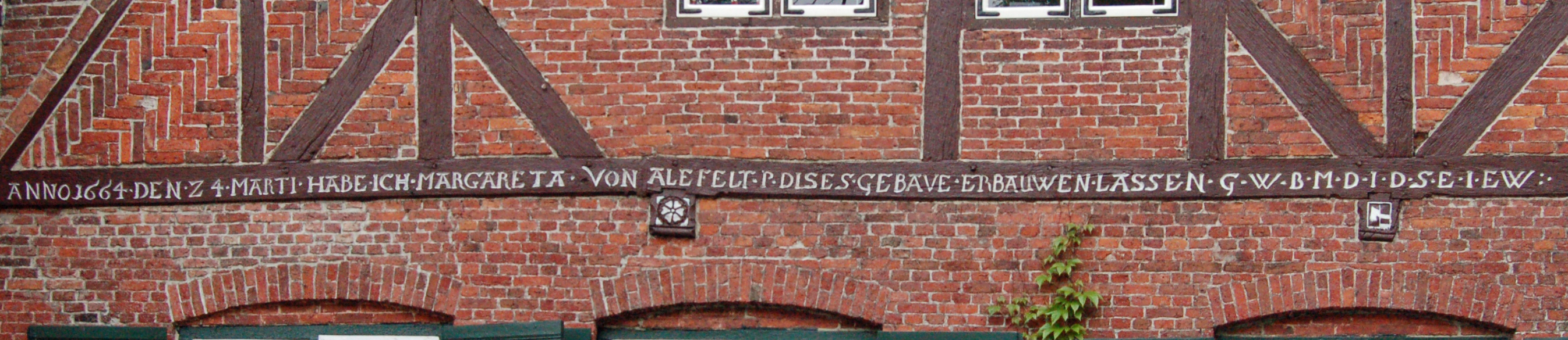 Die Inschrift am Priörinnenhaus im Kloster Uetersen aus dem Jahr 1664. Die Inschrift lautet:ANNO 1644 DEN 24. MARTI. HABE ICH MARGARETA VON ALEFELT. P(riörin). DISES GEBAVE ERBAUWEN LASSEN. G.(ott) W.(olle) B.(ewahren) M.(ein) D.(ach) I.{mmerdar) D.(ir) S.(ei) E.(here) I.(n) EW.(igkeit)